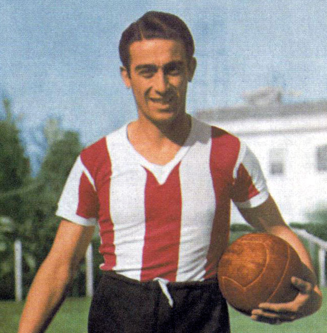 Manuel Pelegrina, "el Payo", máximo goleador de la historia de Estudiantes de La Plata y cuarto del fútbol argentino.